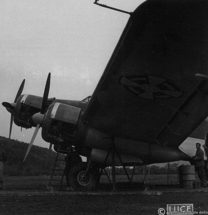 Savoia Marchetti SM.79 - Royal Yugoslavian Air Force